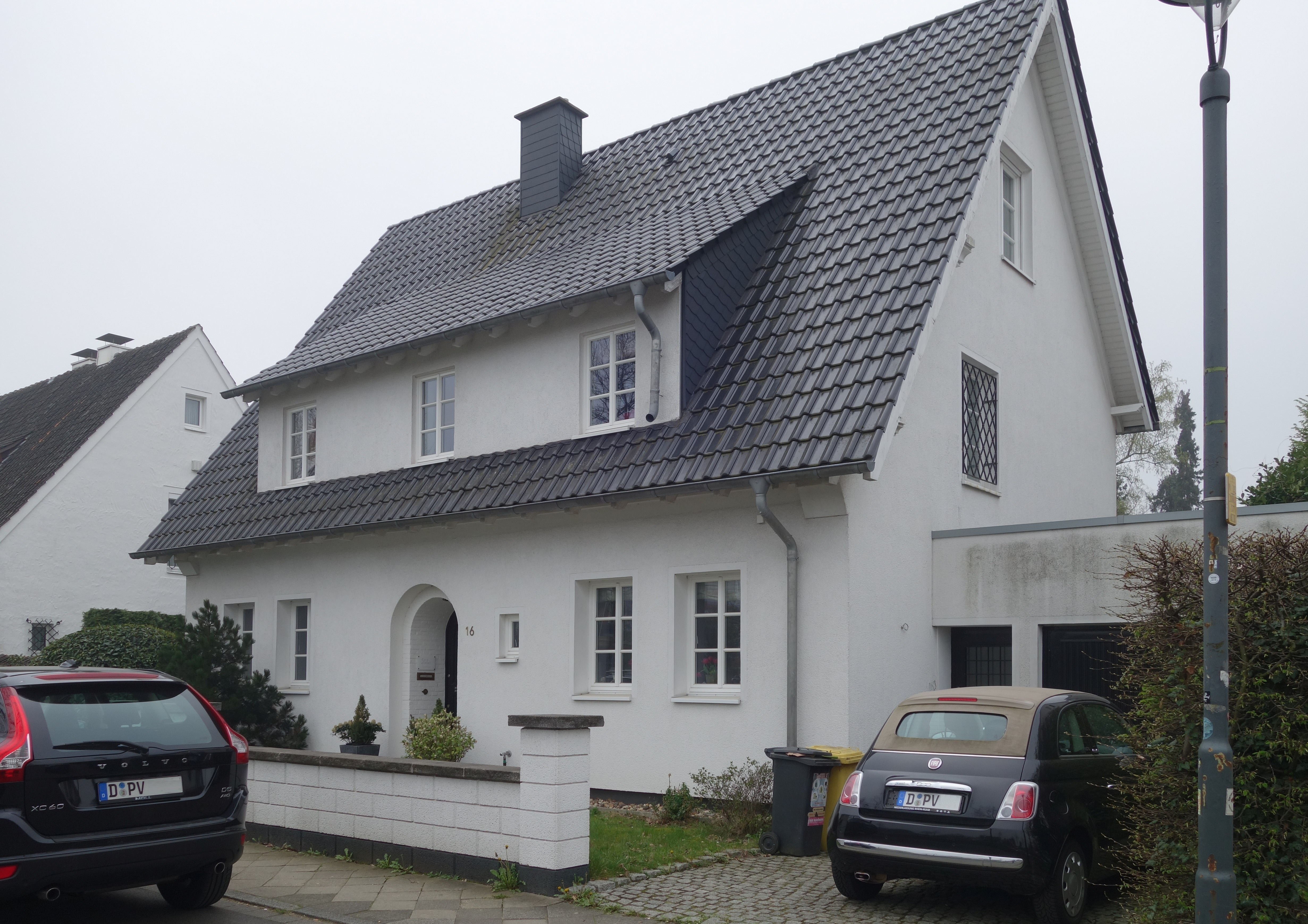 Beckbuschstraße 16, Düsseldorf, 2019.